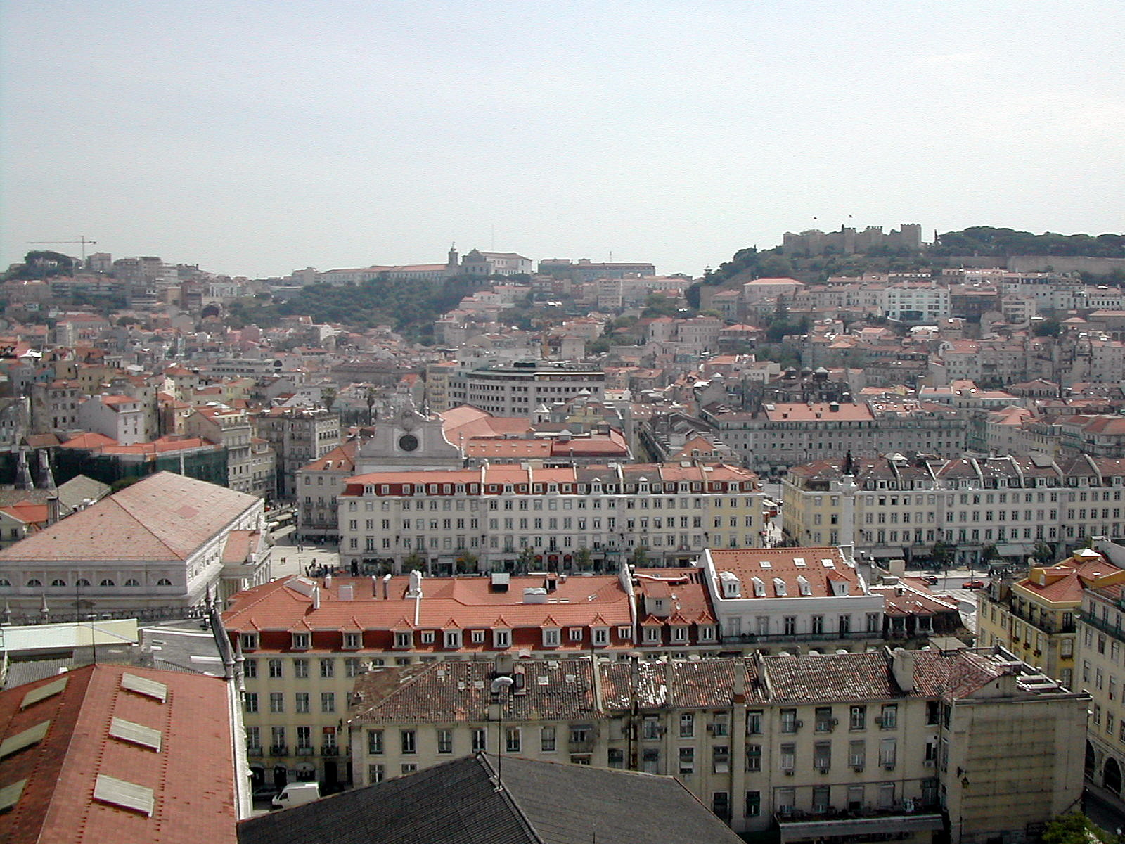 Vista da freguesia de Santa Justa, Lisboa, Portugal